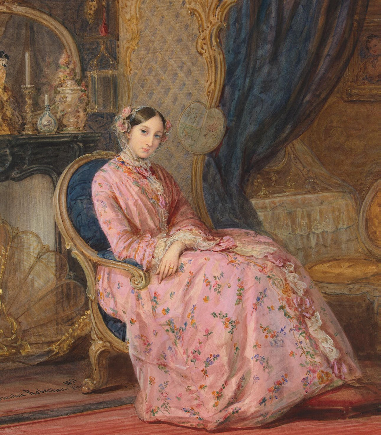 Портрет великой княгини Марии Николаевны